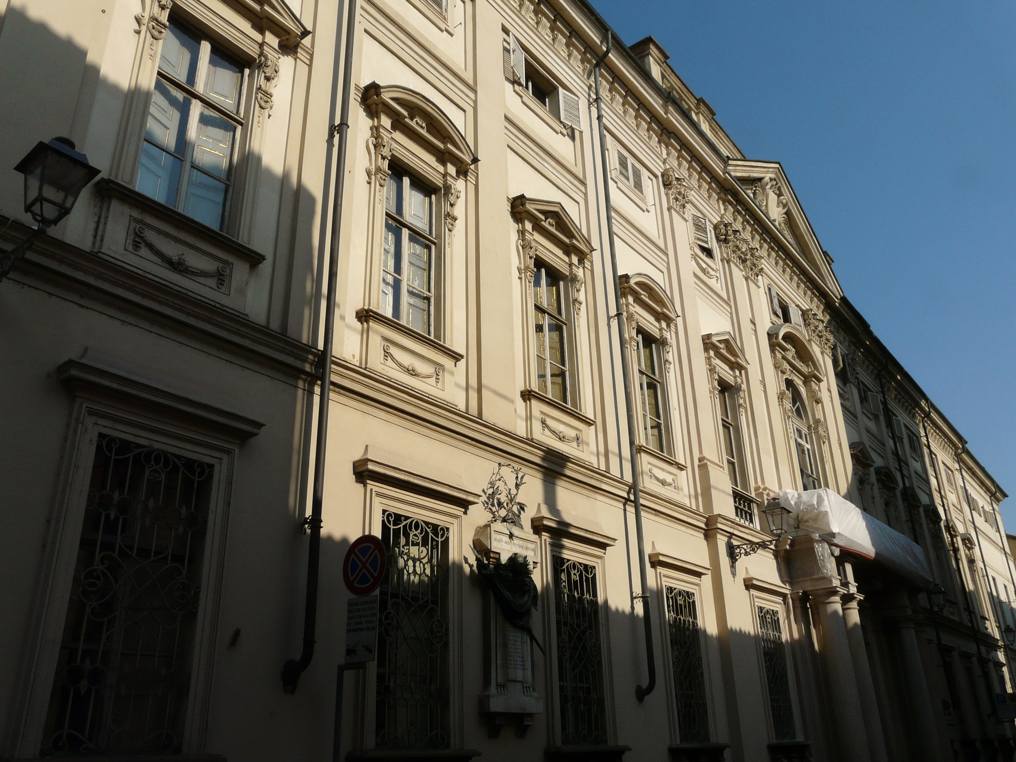 Palazzo Gozzani di San Giorgio, ora palazzo del Municipio, Casale Monferrato, Piemonte, Italia